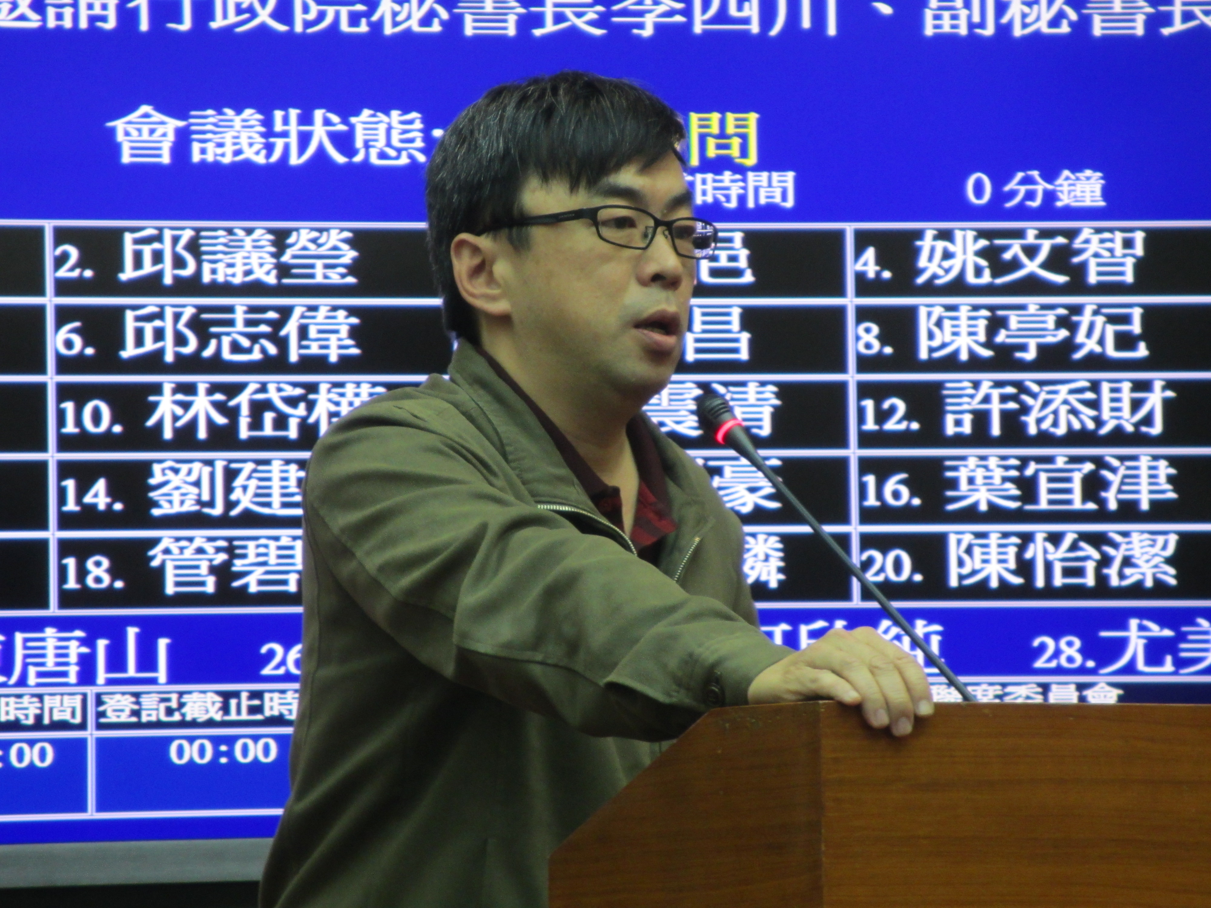 台灣在野黨民進黨立委段宜康。